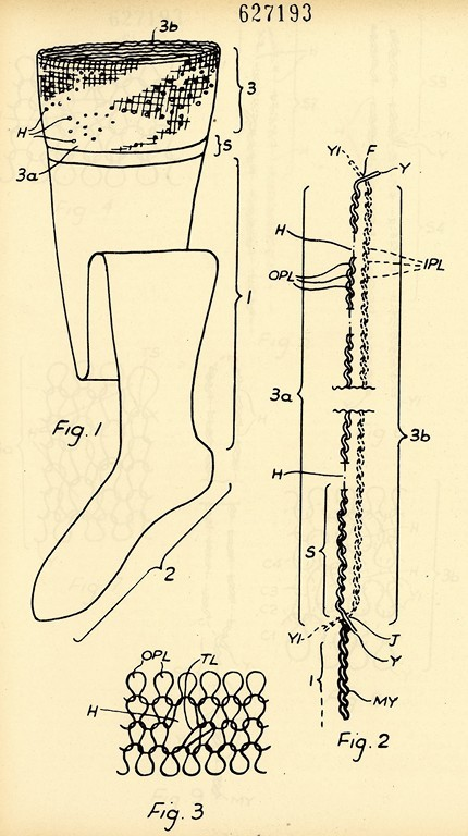 Disegno per il brevetto per invenzione industriale n. 627193, classe D 04 b., della società Kaiser Bondor Ltd per un metodo per la produzione di calze femminili munite di rinforzo, Baldock Herts. Priorità: Gran Bretagna. Domanda di brevetto n. 40136 del 26 novembre 1959. Data di deposito: 23 aprile 1960. Data di concessione: 27 ottobre 1961 (AS Genova, Ufficio provinciale industria, commercio e artigianato di Genova, Fondo Brevetti)